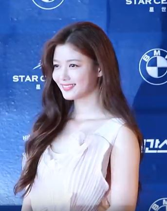 5월 3일 제53회 백상예술대상 레드카펫 현장